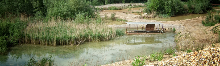 Kieslandschaft Grünes C